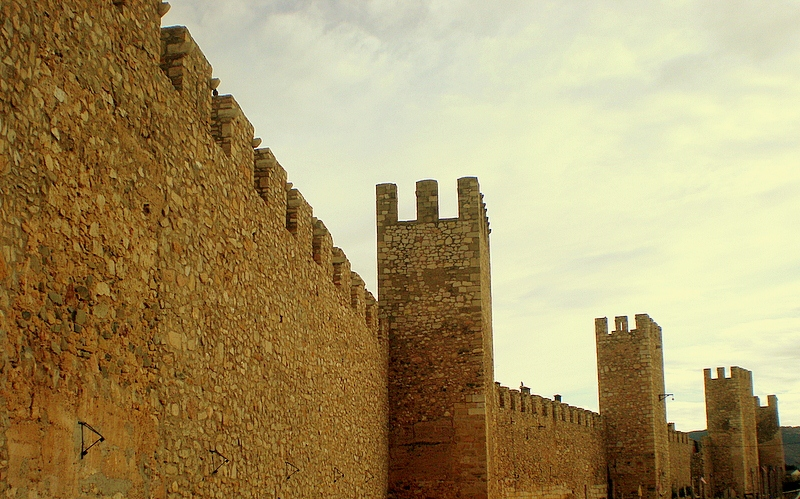 Recinte emmurallat de Montblanc